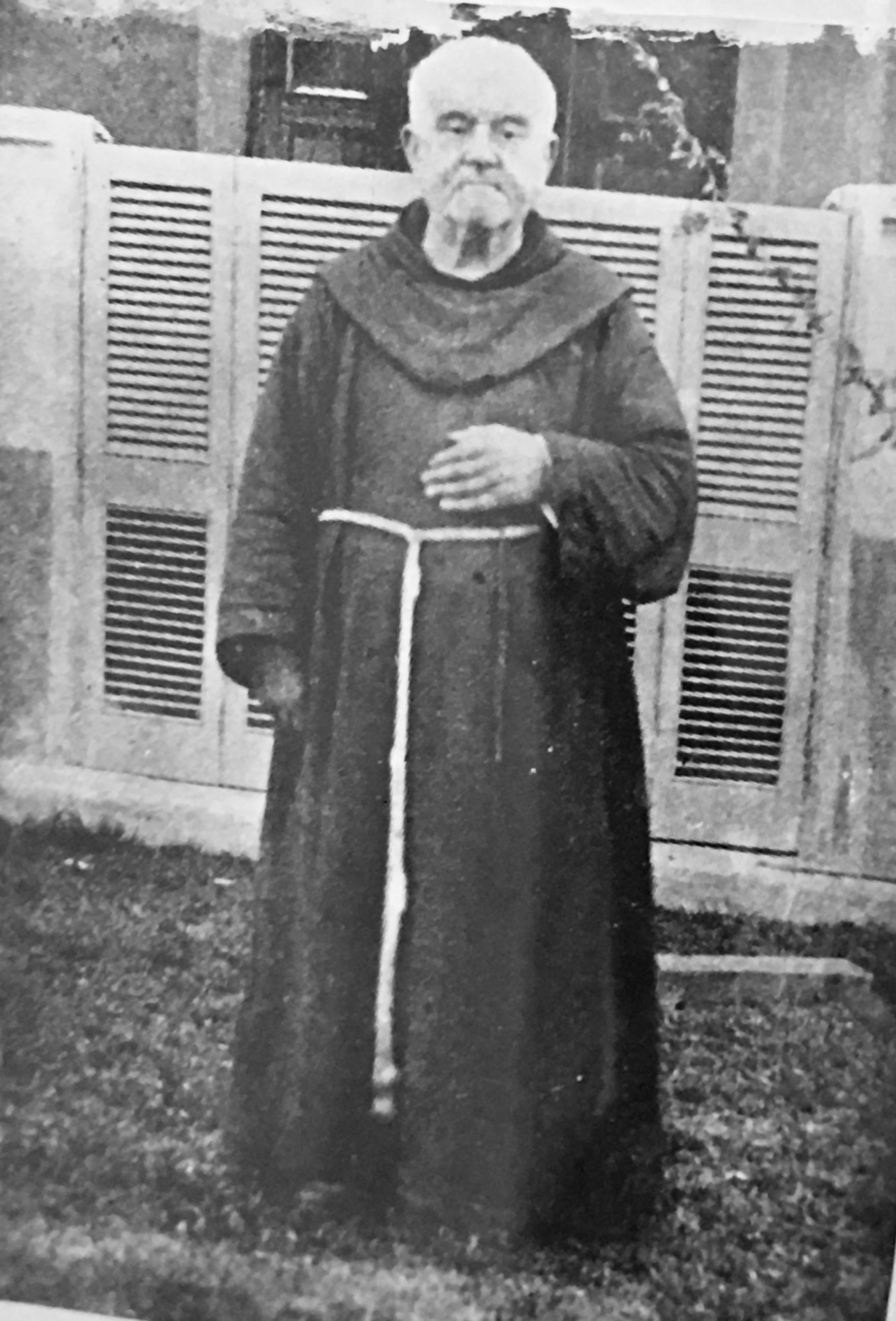 imagen del padre tomada en 1896